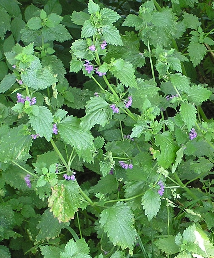 Ballota nigra unter Pappeln am Bonner Rheinufer.